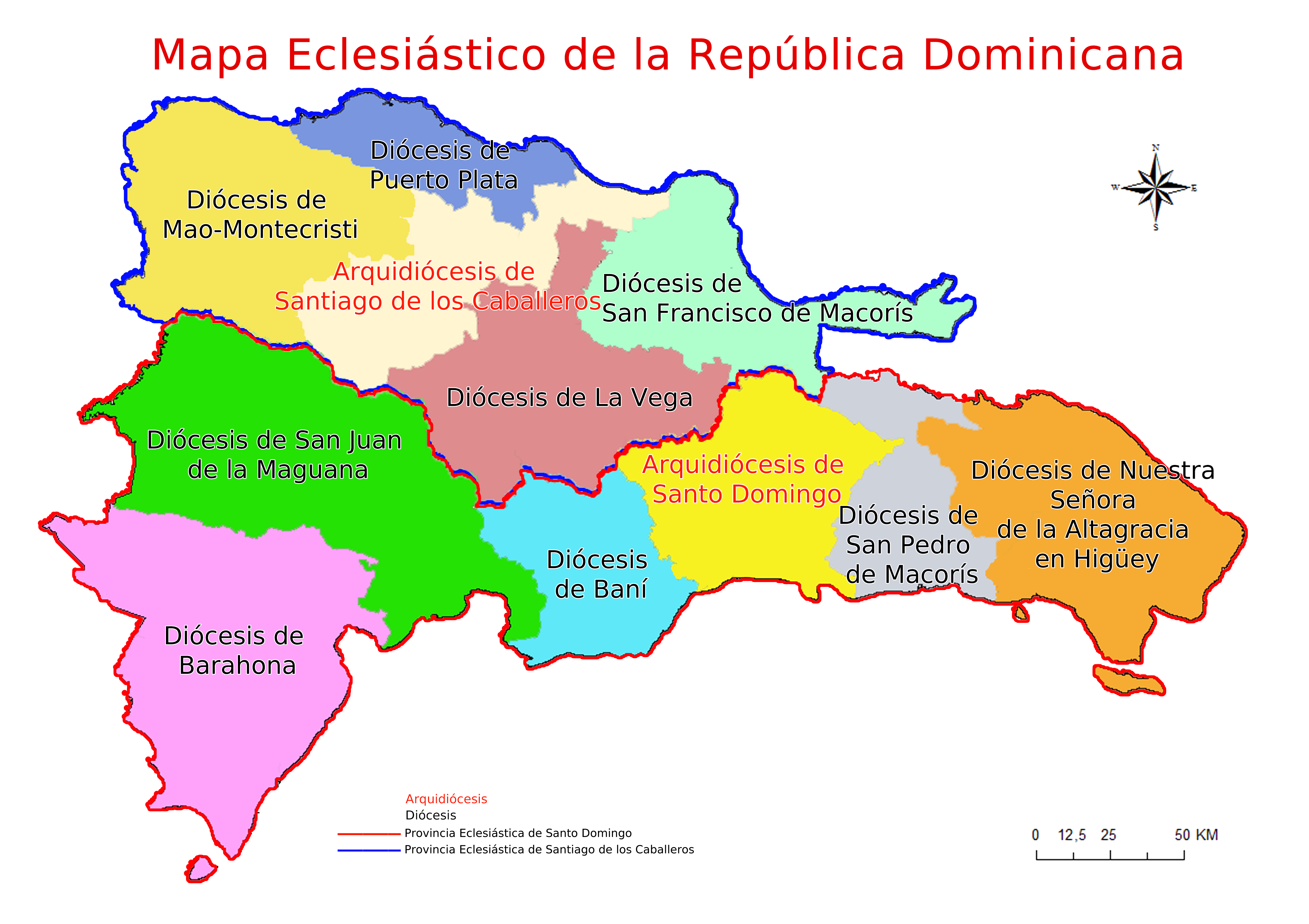 División territorial de las diócesis dominicanas. 9 diócesis, 2 arquidiócesis metropolitanas y 2 provincias eclesiásticas.